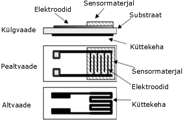 MOS-sensori struktuur